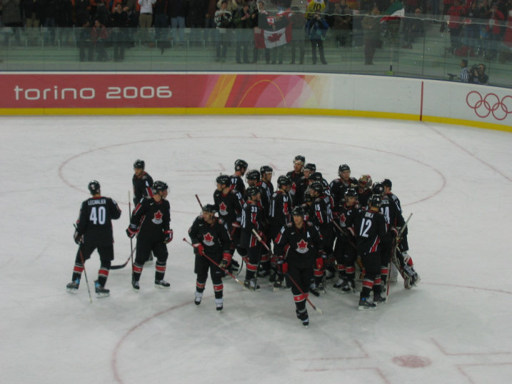 Team Canada